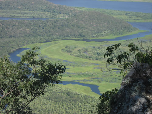 rio paraguay